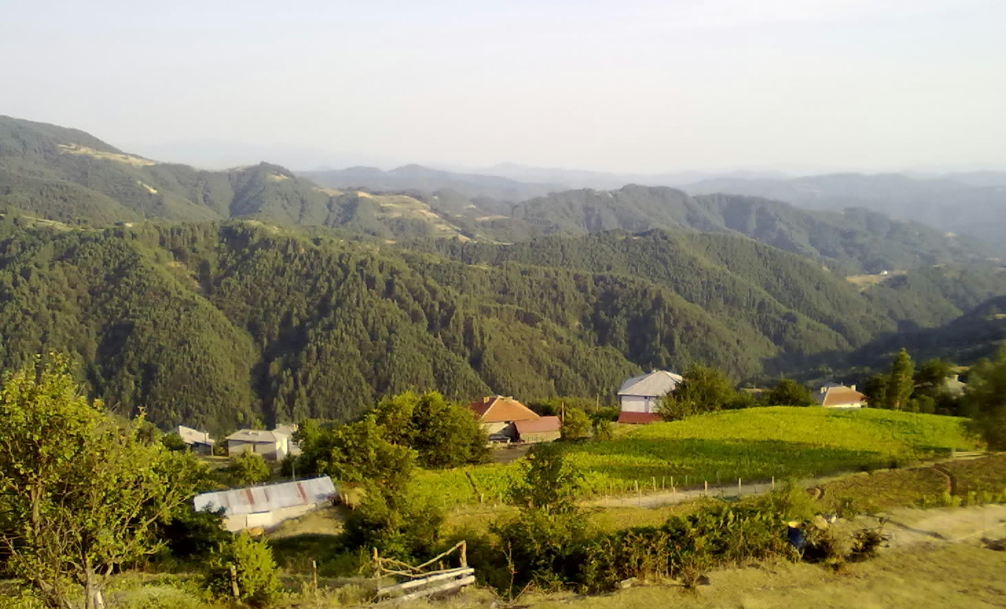 Махала Мусурлийце,село Гърнати